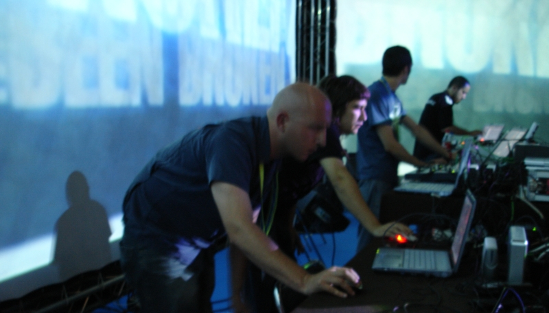 Sesión en directo de 3 vj's (videojockeys) y un dj. Pueden apreciarse los ordenadores portátiles utilizados así como discos duros externos. De fondo vemos la proyección de los videos que se están mezclando.